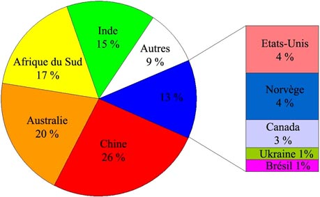 Réserve de Titane dans le monde exploitable technologiquement en 2005. Schéma réalisé à partir des données de GAMBOGI (G.) pour le compte du U.S. Geological Survey, Titanium mineral concentrates, Reston (États-Unis) : U.S. Geological Survey, january 2005, p 176-177.